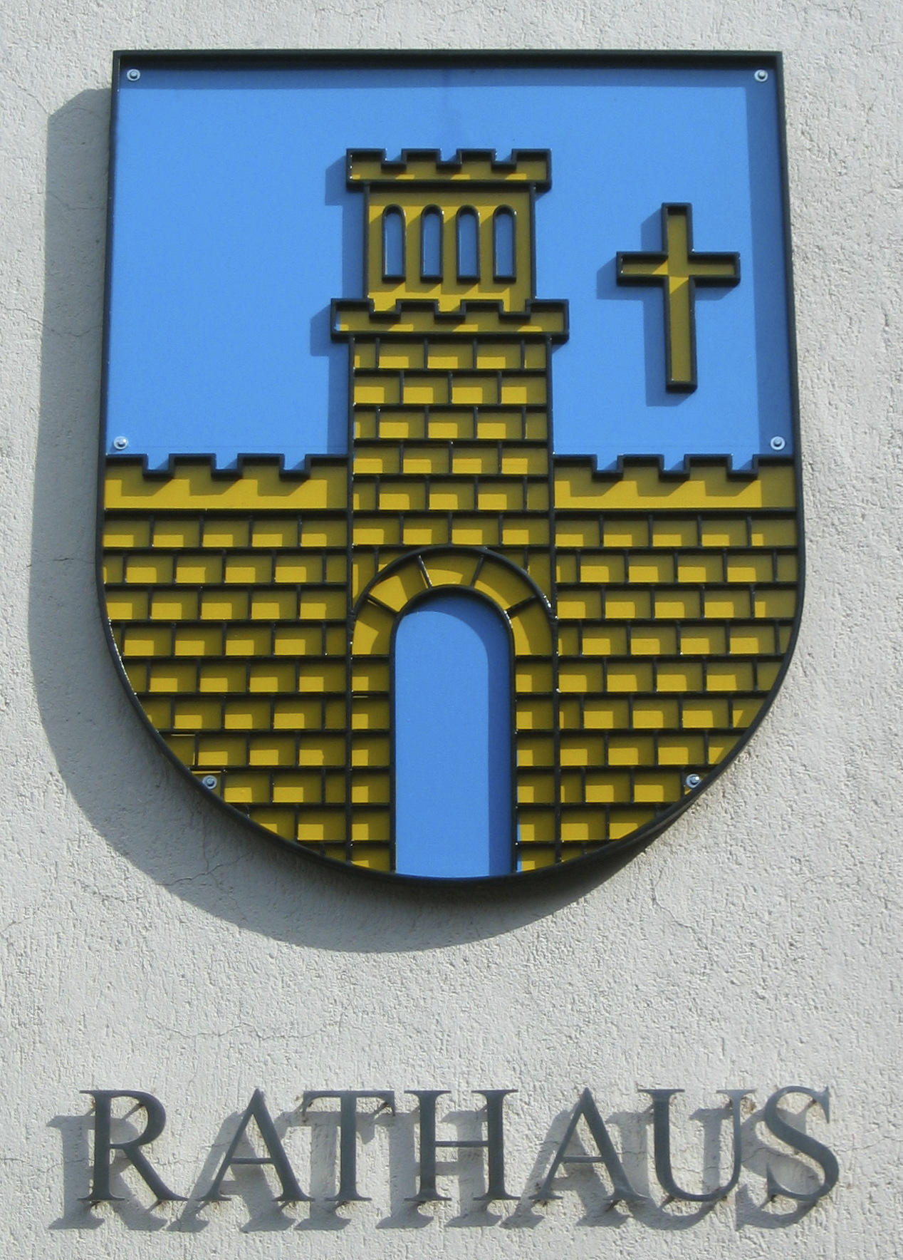 Stadtwappen am Rathaus von Bad Driburg, Deutschland.